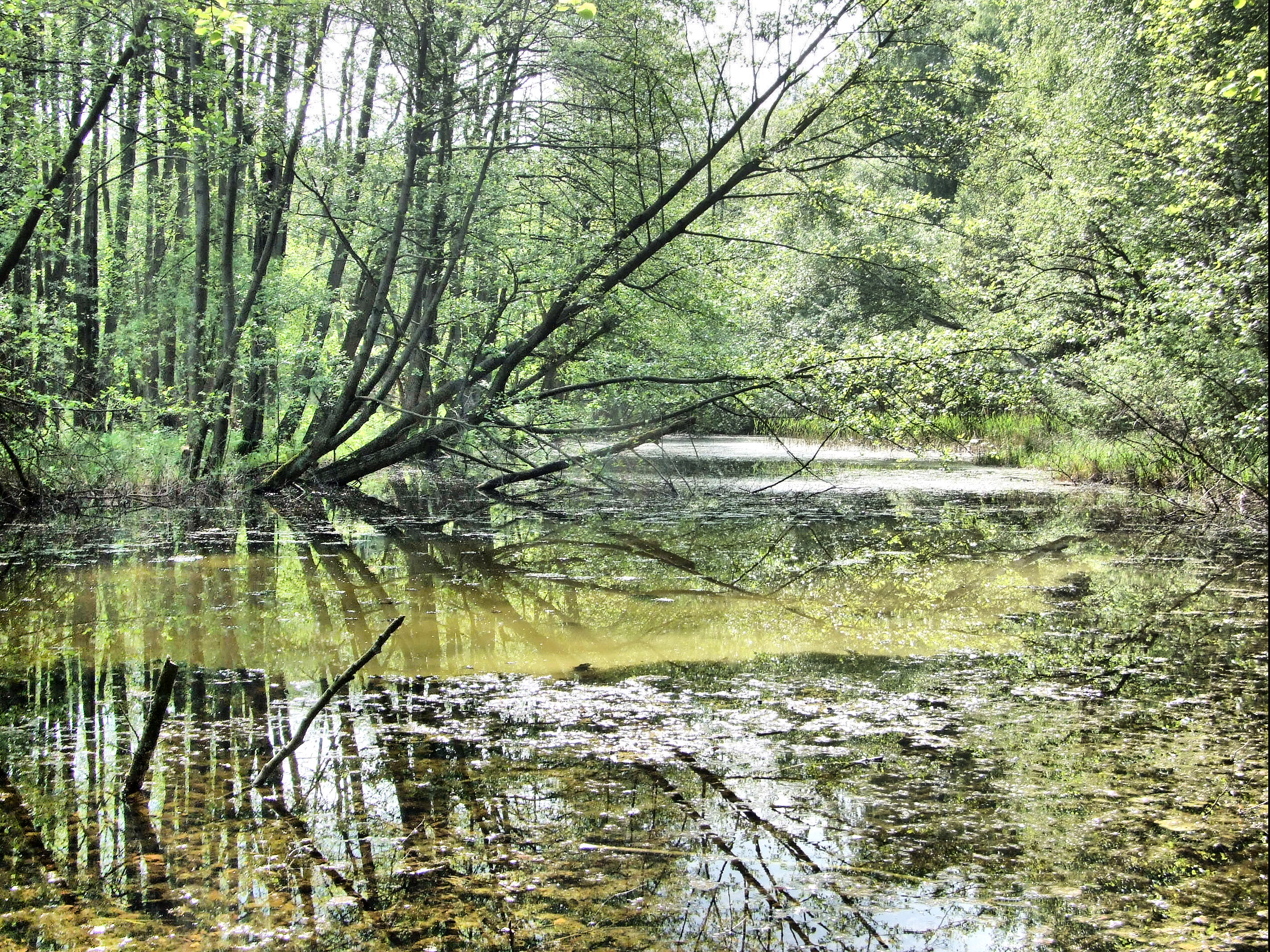 Jeziorko Lipka